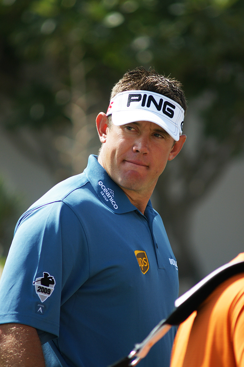 Lee Westwood in 2010.